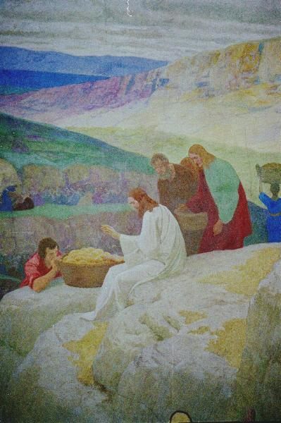 Pfarrkirche St. Stephan in Moggast, Stadt Ebermannstadt, (Landkreis Forchheim): Deckengemälde "Wundersame Brotvermehrung" von Gebhard Fugel, 1926